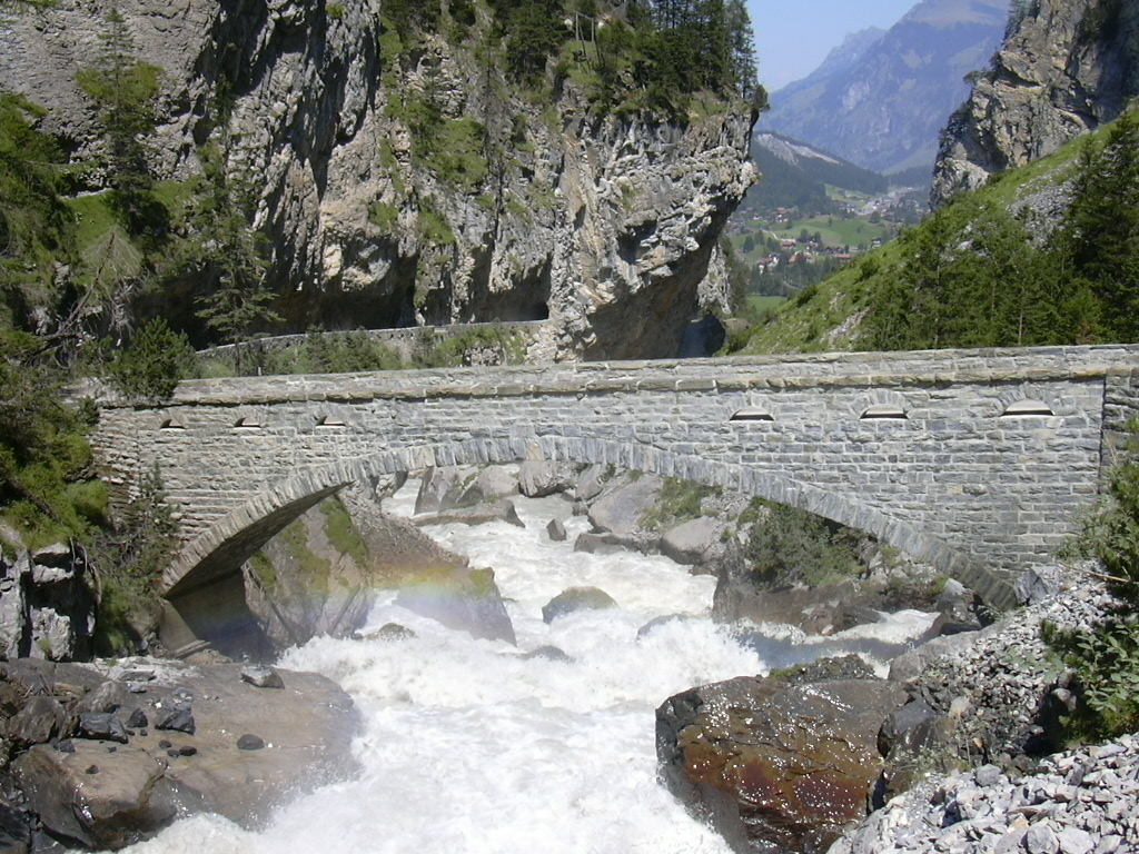 Brücke über die Kander in der Klus am Anfang des Gasterntals